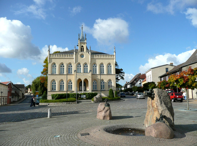 Marlow: Blick zum Rathaus